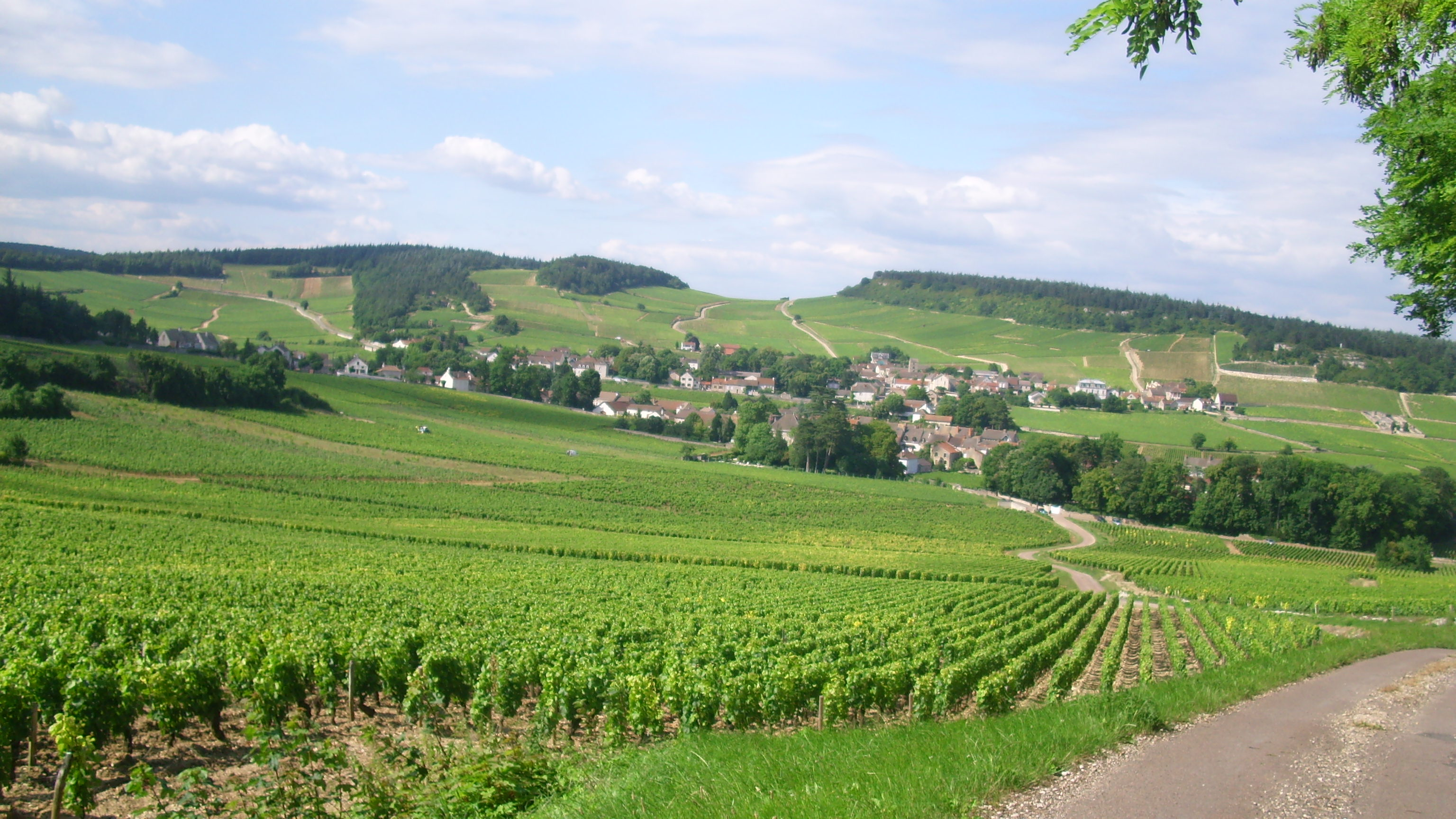 Vue de Mercurey et d'une partie de son vignoble